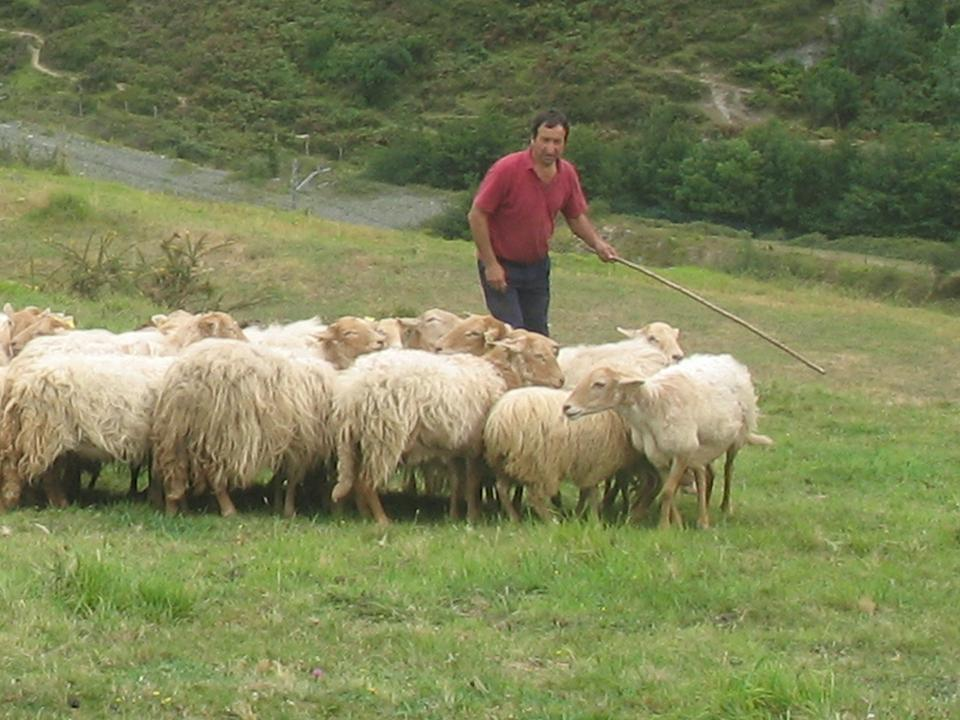 Sasiardiak punta mendatan beraien artzaiarekin.